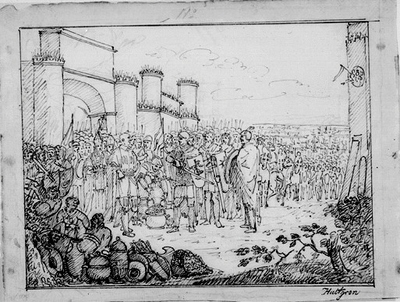 Anders Hultgren, Ragnar Lodbrok brandskattar Paris, frihandsteckning med blyerts, penna och bläck, på papper. Mått 22 x 29 cm, passepartout 55 x 42 cm. Nationalmuseum, inventarienummer Inv. NMH125/1893, 48384. Signerad Hultgren (nere till höger).